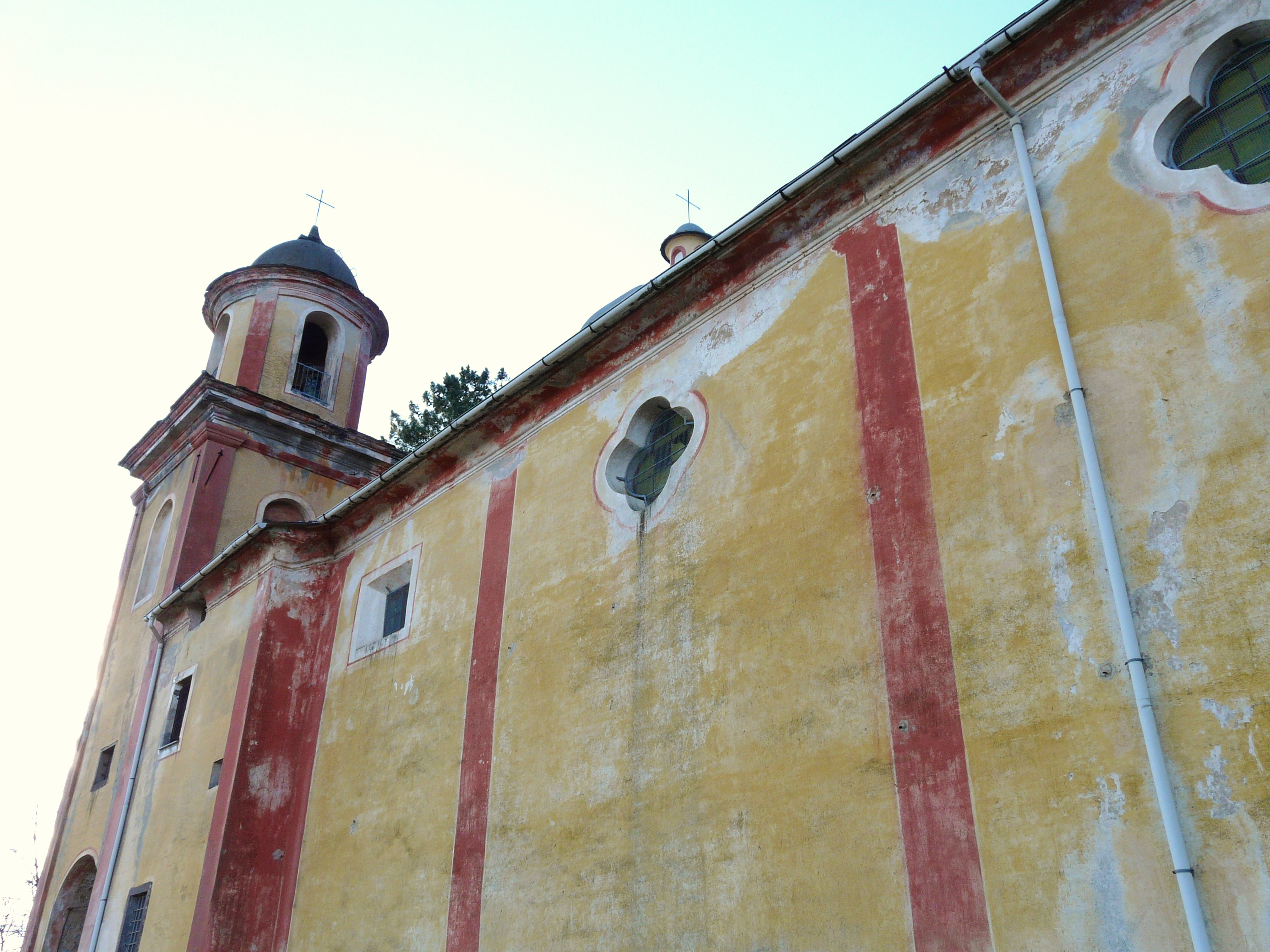 Santuario di Nostra Signora dell'Agostina, Riccò del Golfo di Spezia, Liguria, Italia